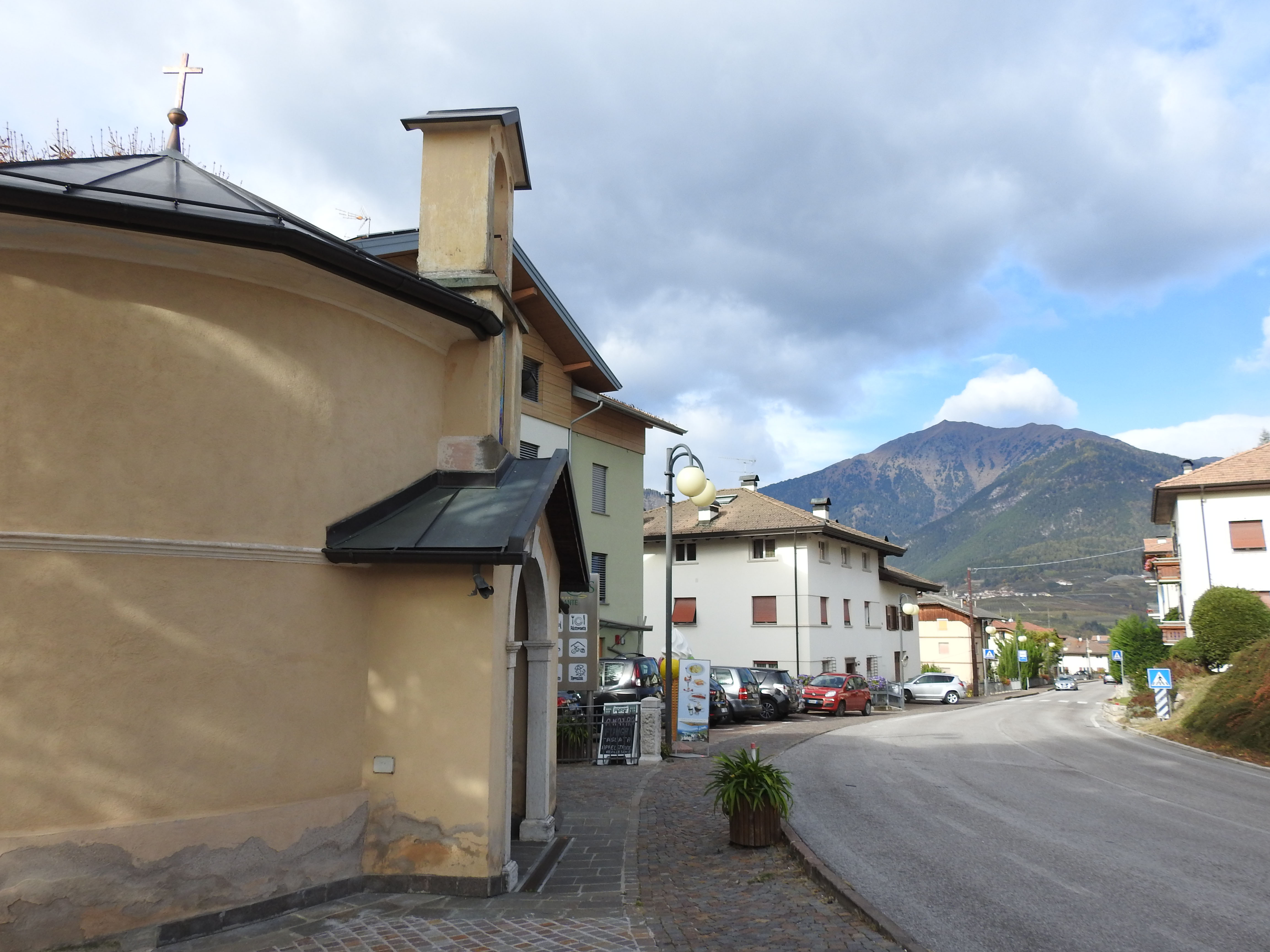 Cagno, Trentino - Via Nazionale